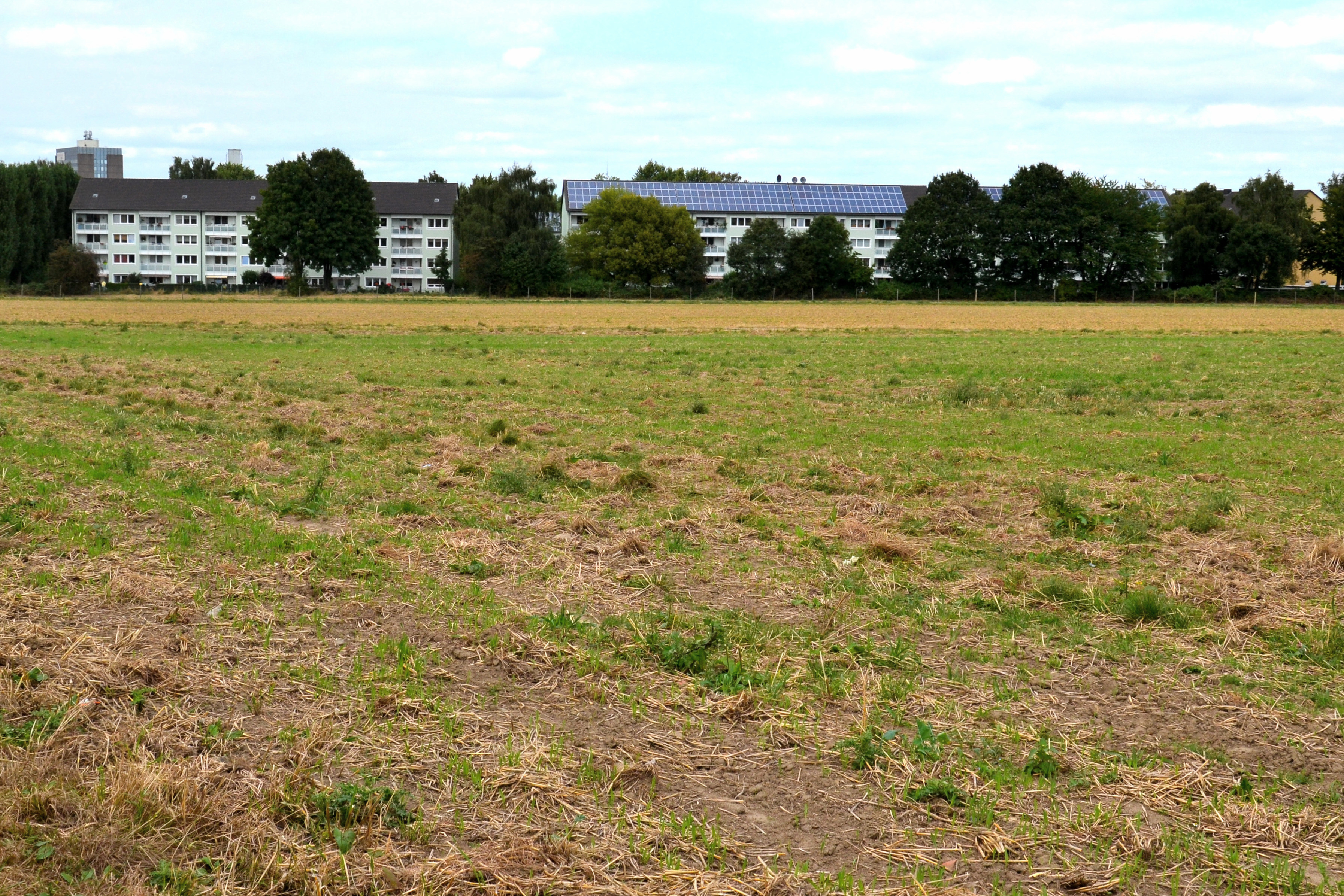 Wohnsiedlung (ehem. Krupp) in Essen-Fulerum, auf dem Gelände des ehemaligen KZ-Außenlagers an der Humboldtstraße